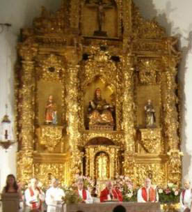 Retablo de la preĝejo de Sankta Petro.